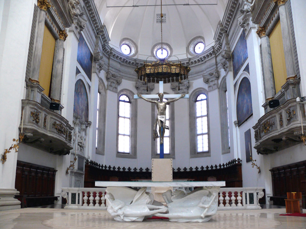 Duomo di Padova - presbiterio